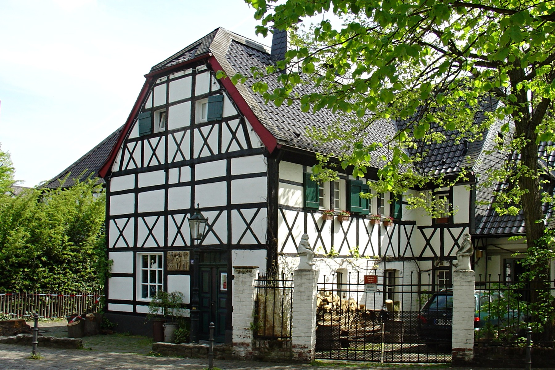 Fachwerkhaus Kückeshaus, Hilden, Eisengasse 2, Denkmal Nr. 6 This is a photograph of an architectural monument.